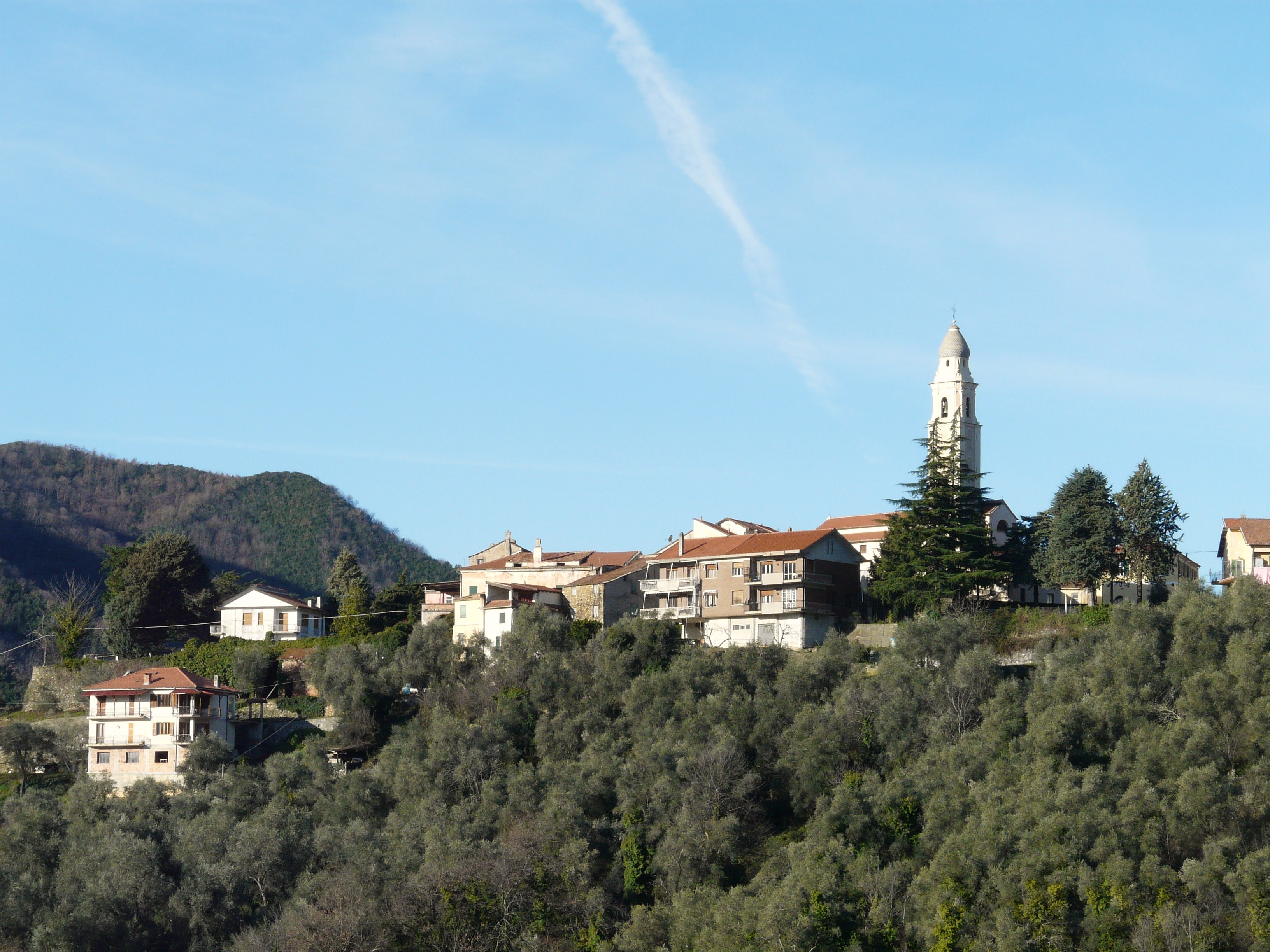 Casanova Lerrone, Liguria, Italia